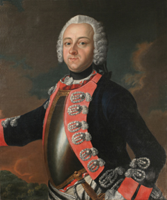 Hartwich Leberecht von Naumeister (* 1707 auf Gut Großen-Salza; † 12. Januar 1760 in Schweidnitz) war preußischer Oberstleutnant und Chef des Grenadier-Bataillons Naumeister. Öl auf Leinwand, 81 x 69 cm